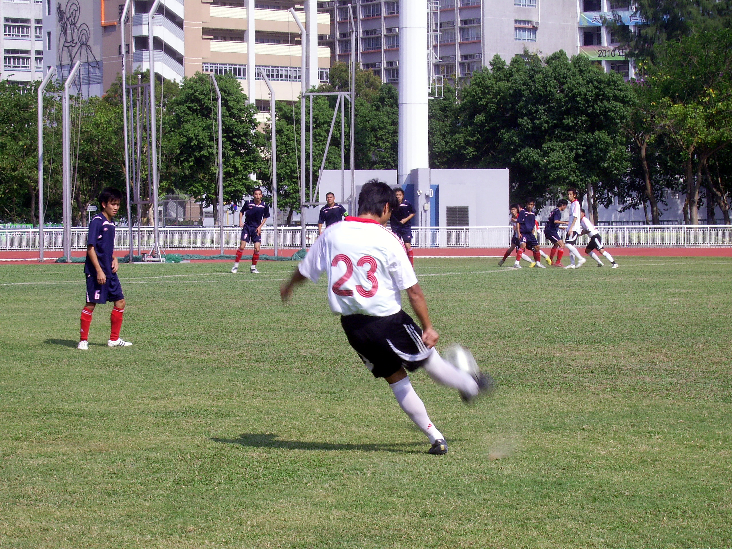 中文（香港）: 龍城康體1-0力克電訊